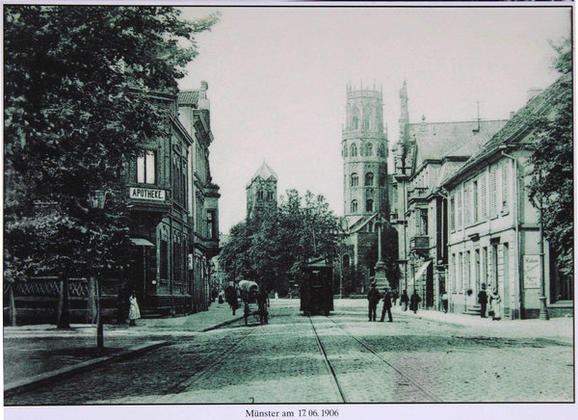 Ludgeri-Straße in Münster, links die Stern-Apotheke